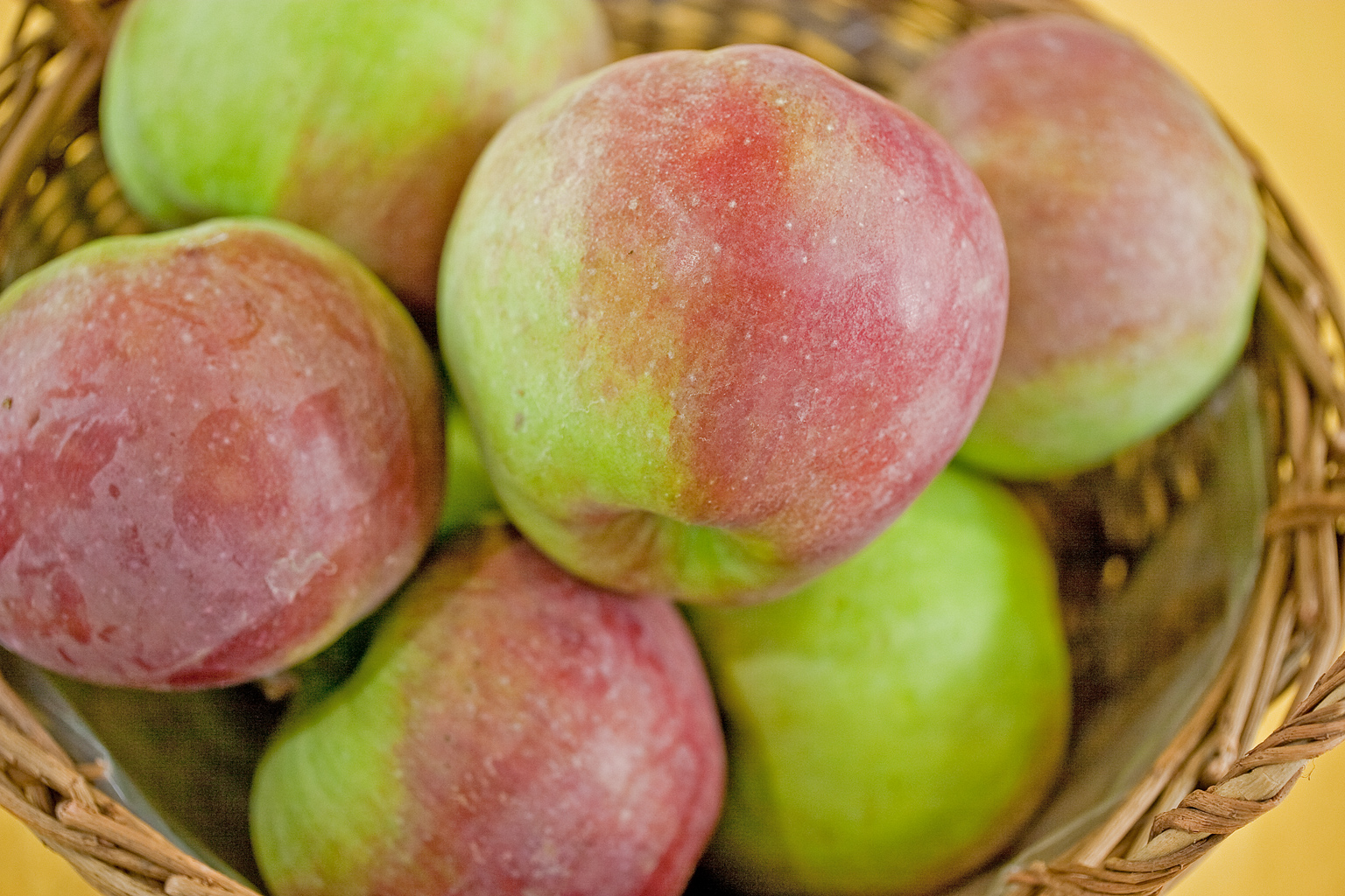 Der Bismarckapfel ist eine Apfelsorte